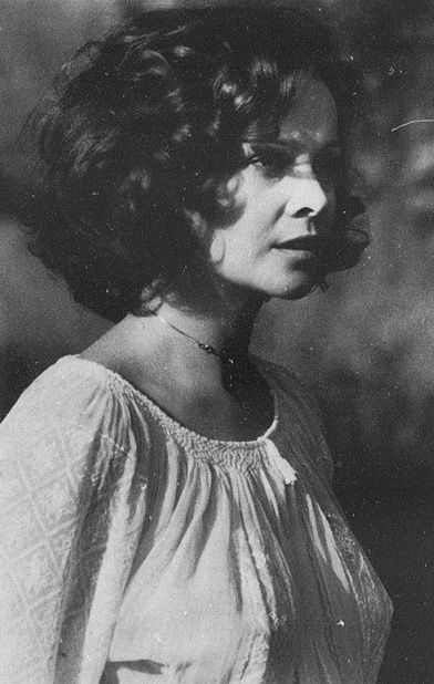 Italian actress Laura Antonelli